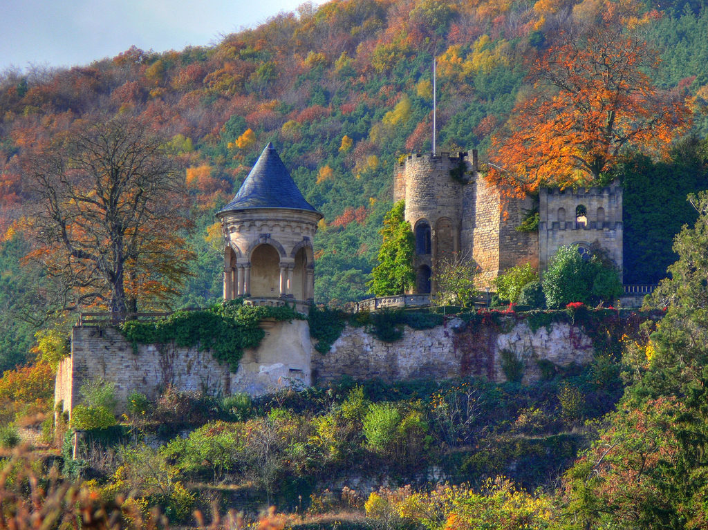 Anlagen Burg Winzingen / Haardter Schloss